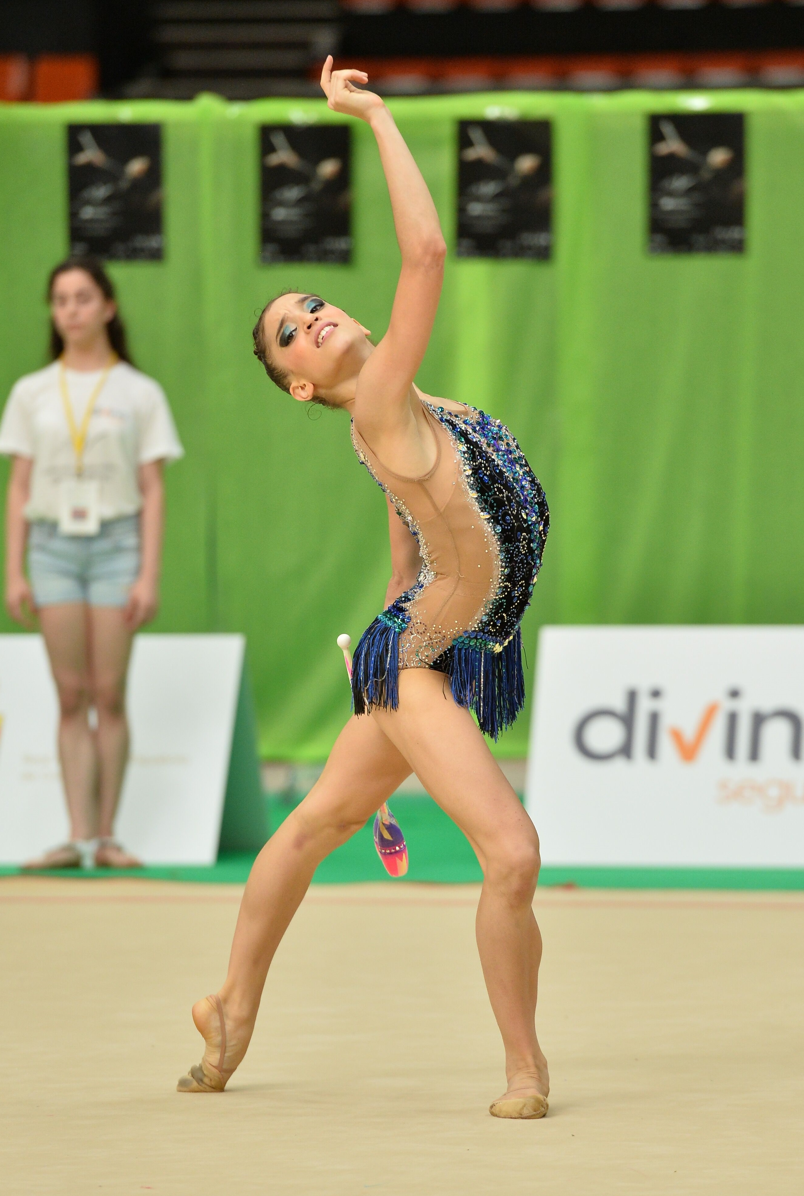 Sara Llana en el Campeonato de España Individual en Valencia en junio de 2017.